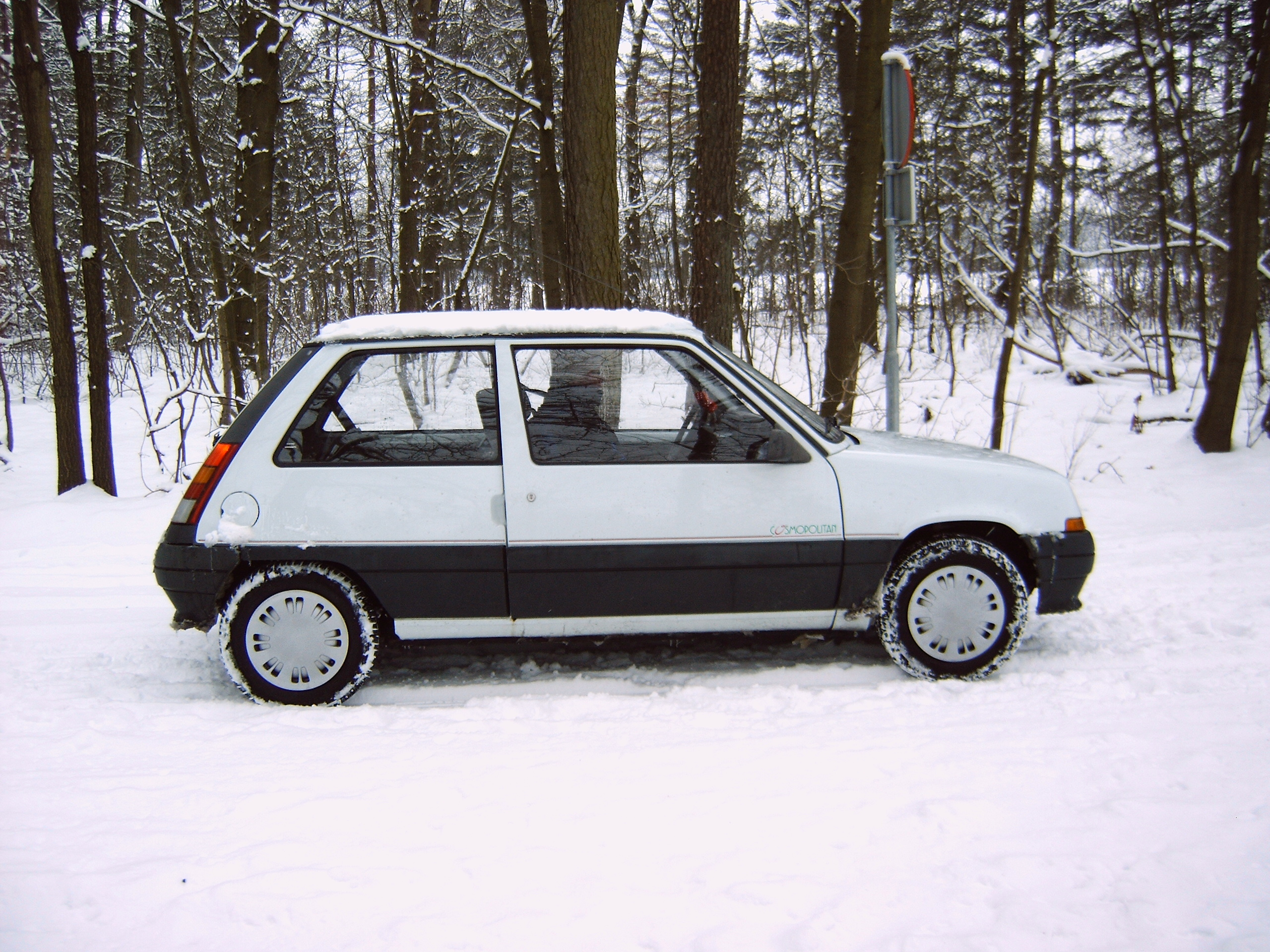 Foto gemaakt door Monique Korthuis.